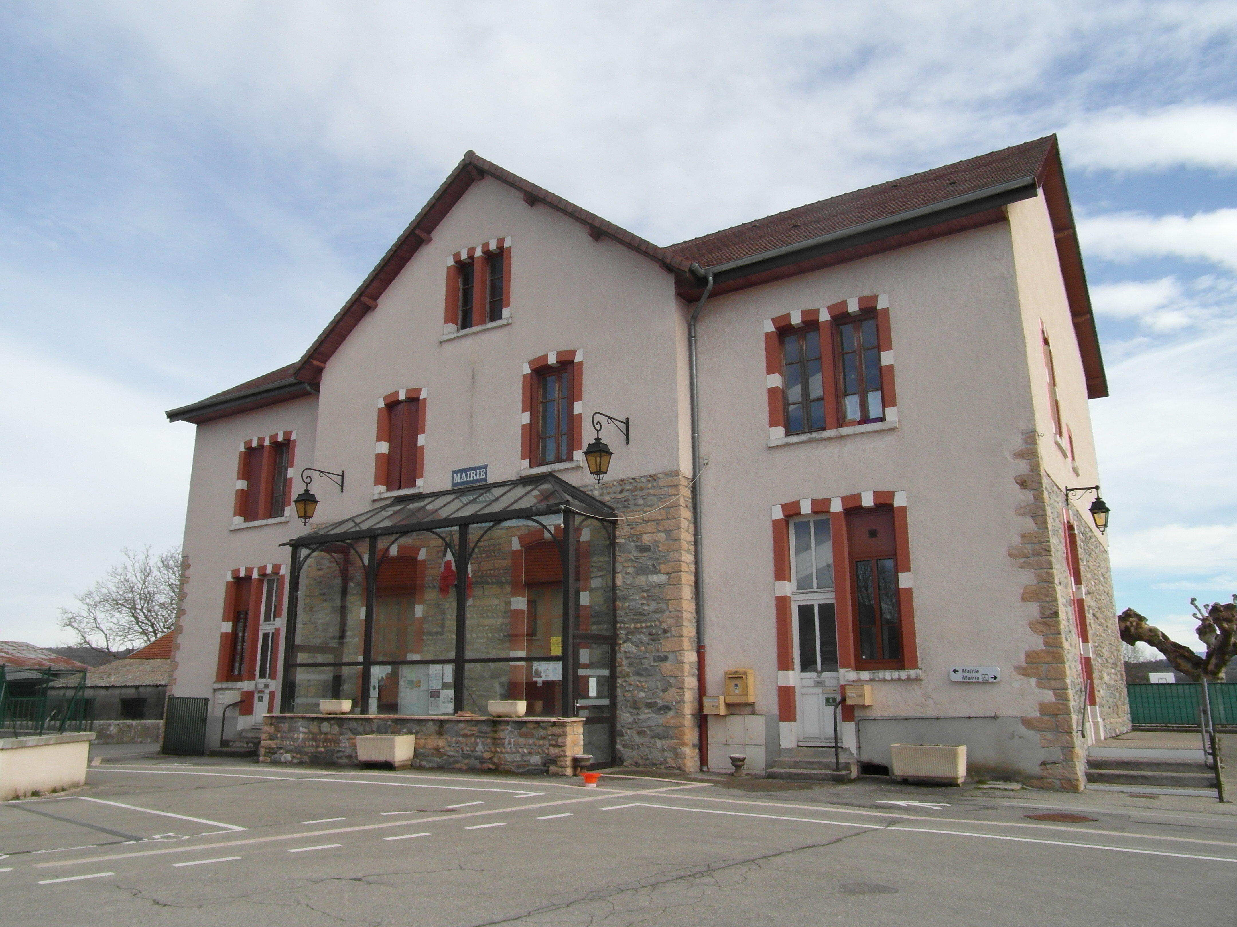 Mairie de Belmont en mars 2019